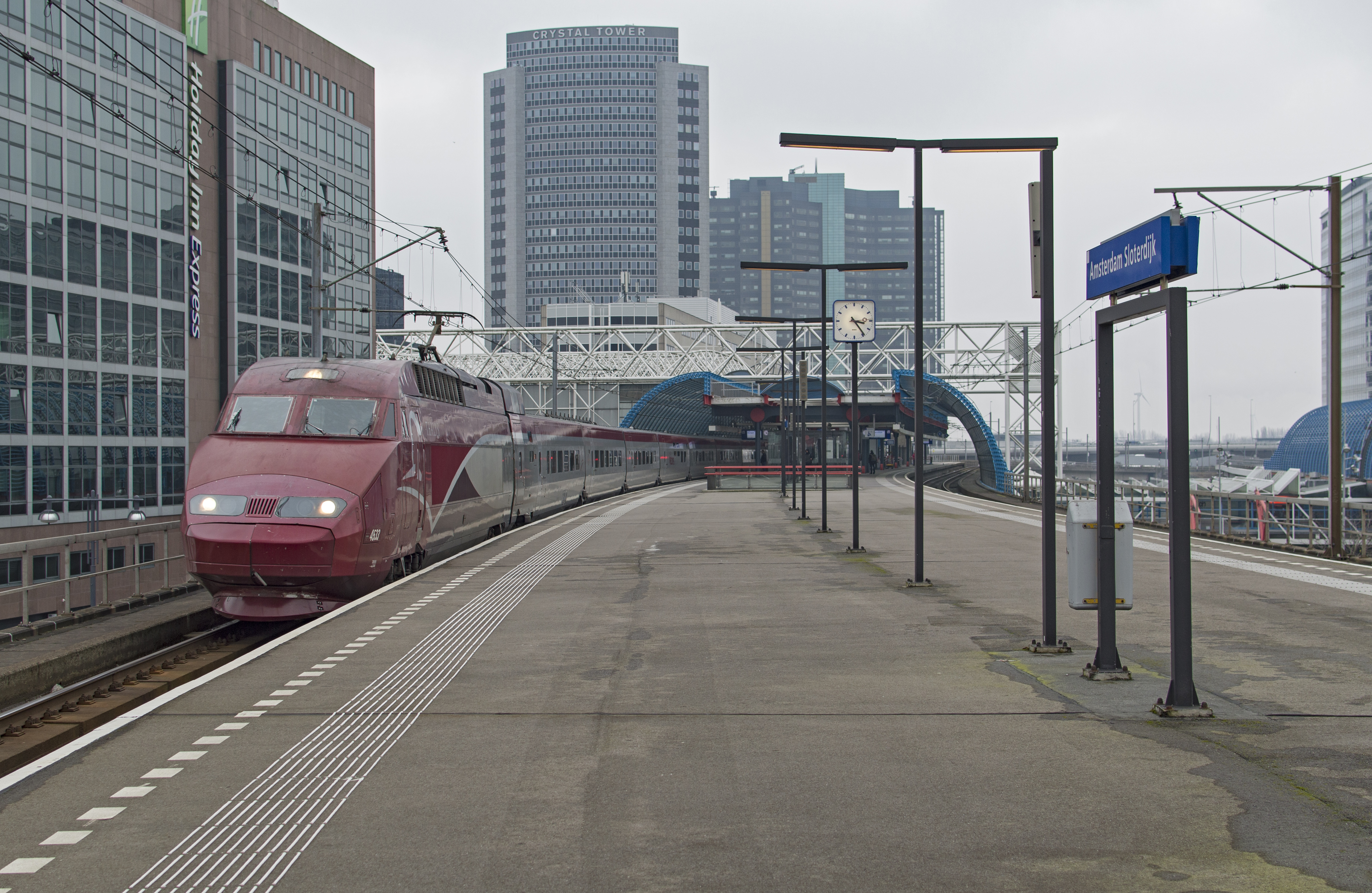 Thalys PBA stel 4533 komt door Amsterdam Sloterdijk onderweg als trein 9364 naar Paris Nord